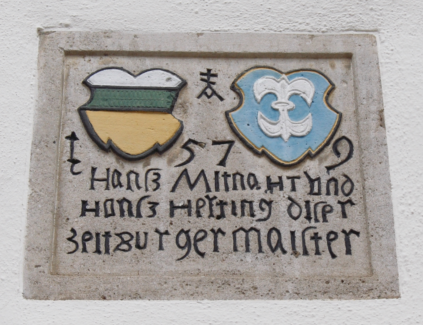 Rathaus in Grünsfeld im Main-Tauber-Kreis (Baden-Württemberg), Hauptstraße 12